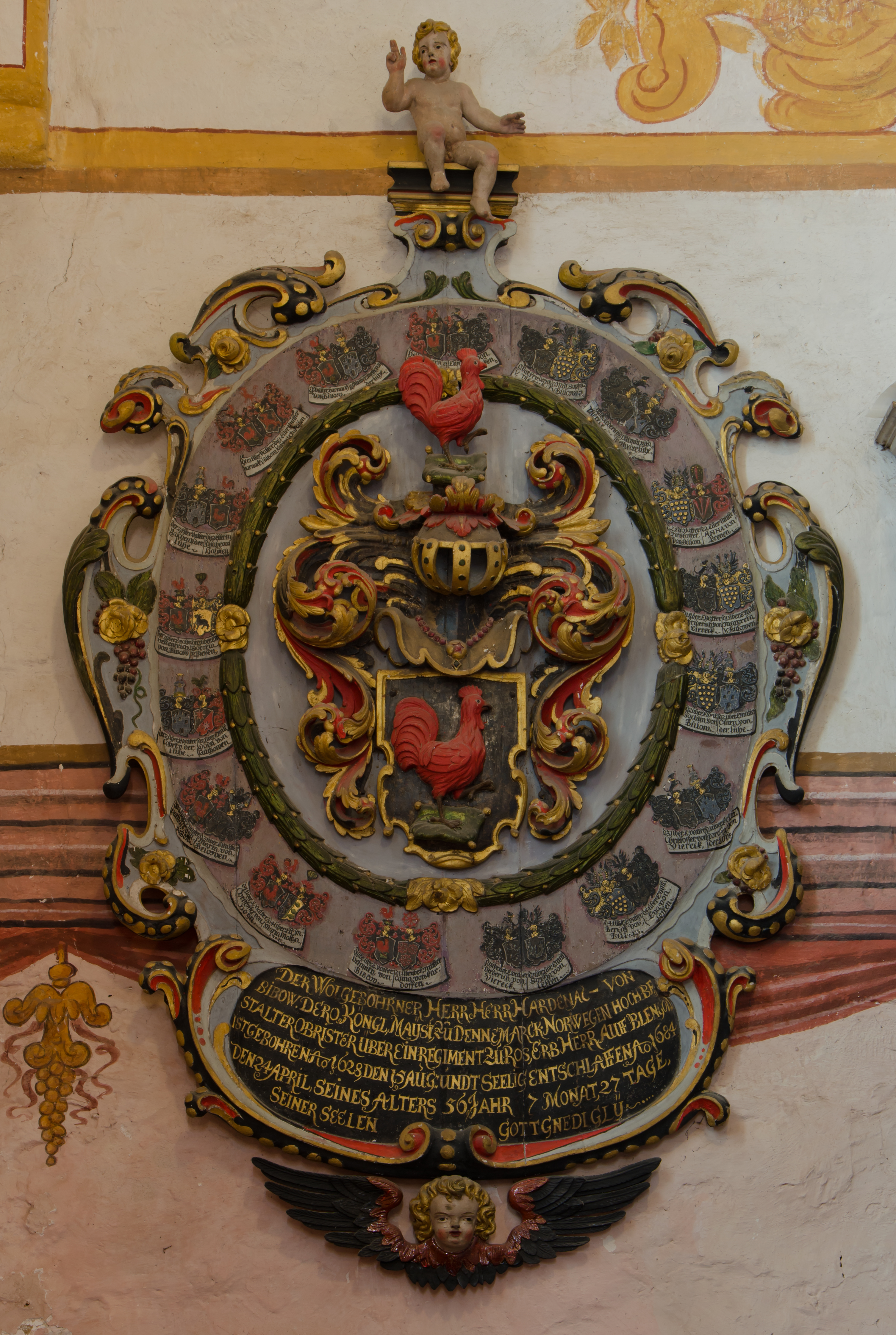 Rerik Kirche Wappenschild Hardenack von Bibow